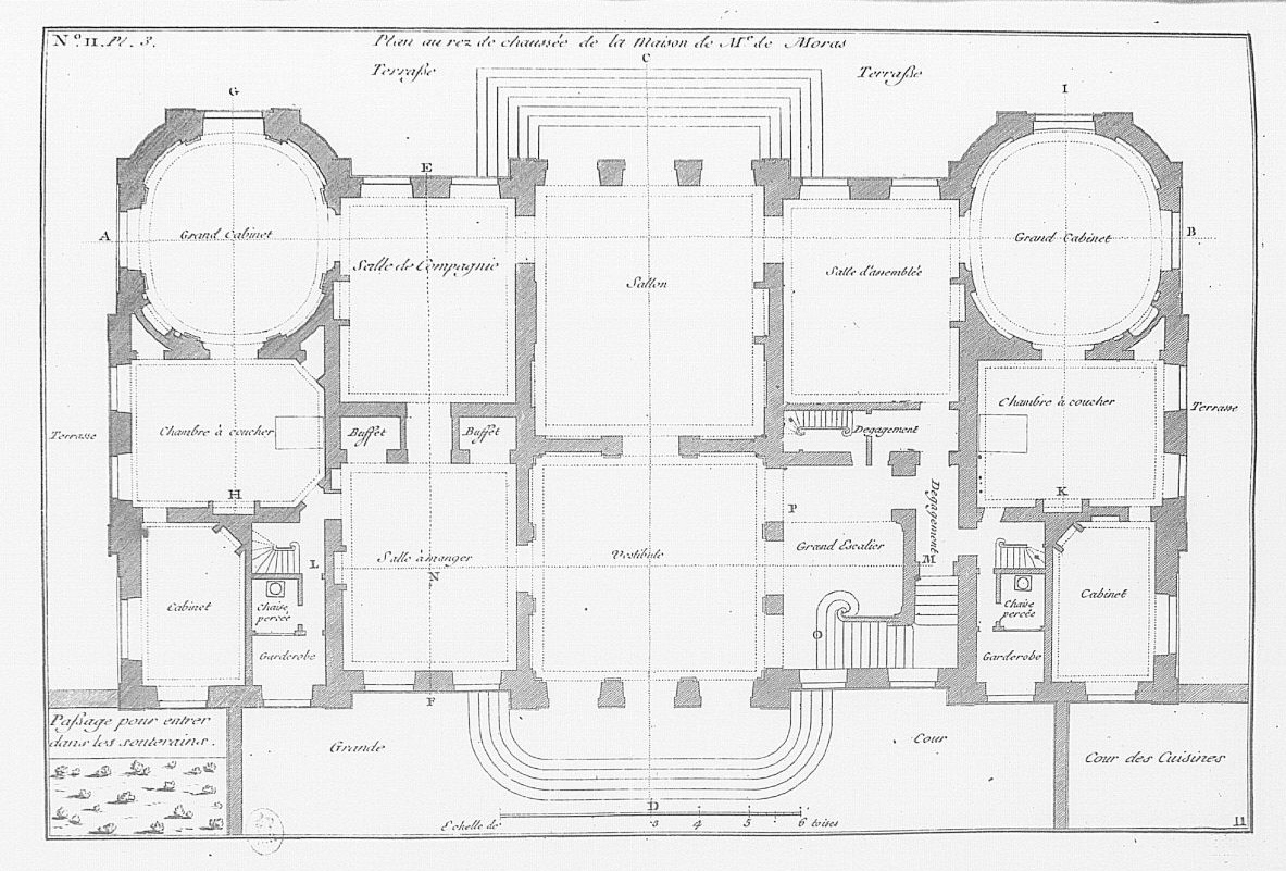 Rez-de-chaussée de l'hôtel de Moras, planche de l'Architecture françoise